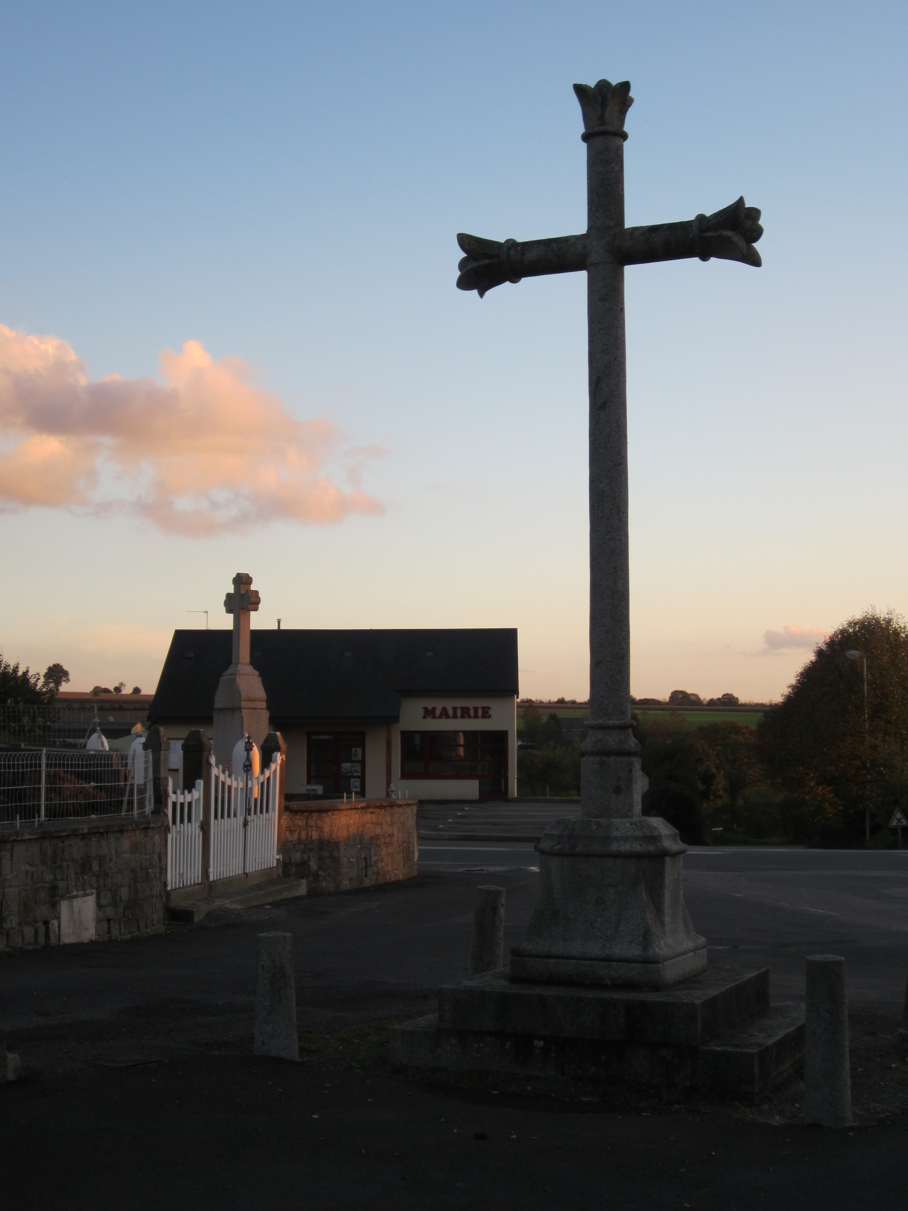 la Mancellière, Isigny-Le-Buat, Manche